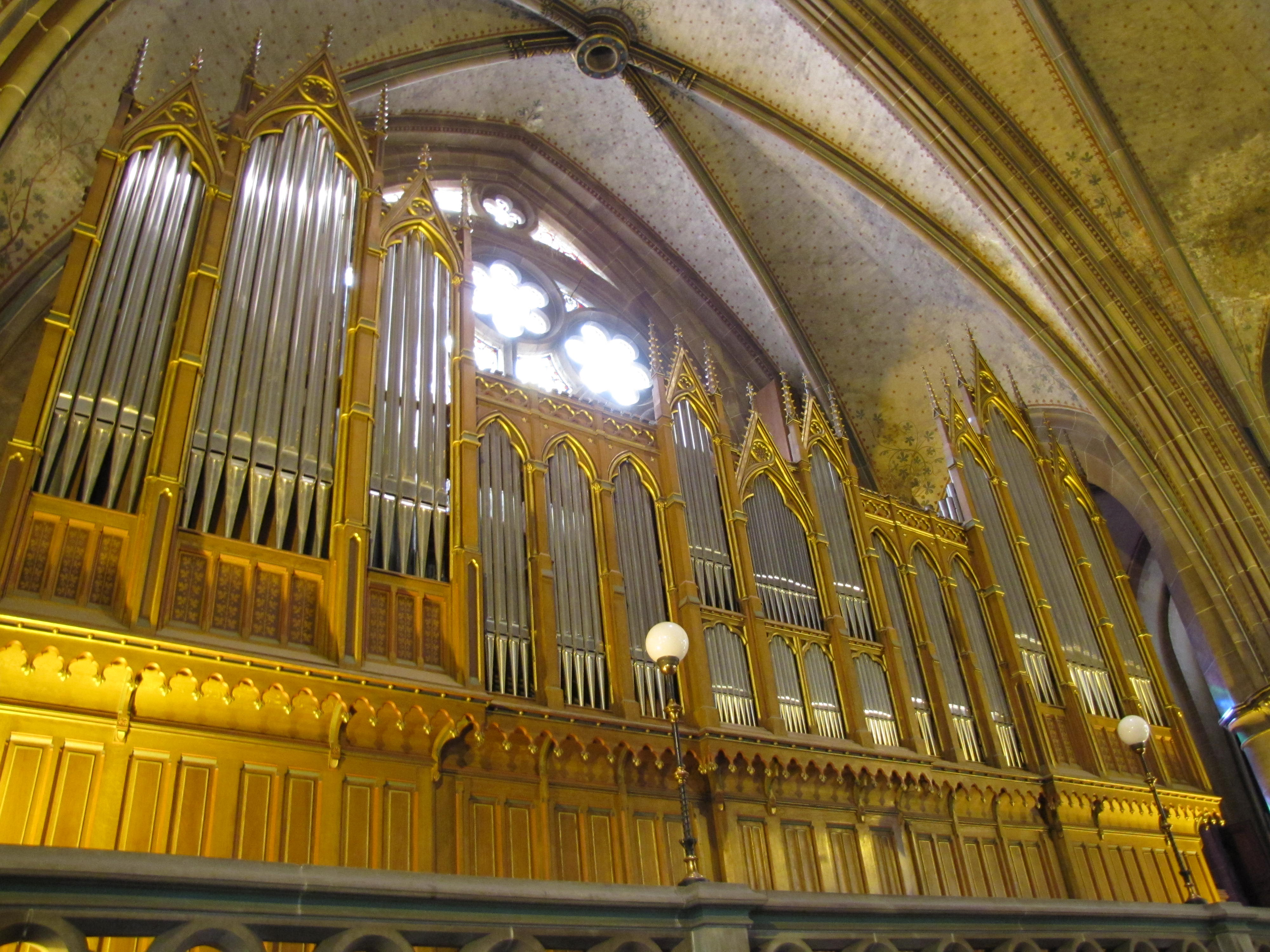 Alsace, Bas-Rhin, Église réformée Saint-Paul (1892) de Strasbourg (PA00085029), place du Général-Eisenhower.Orgue Walcker (1897), classé le 14/4/1987: This object is classé Monument Historique in the base Palissy, database of the French furniture patrimony of the French ministry of culture, under the references PM67001128 and instrument PM67000385 instrument.